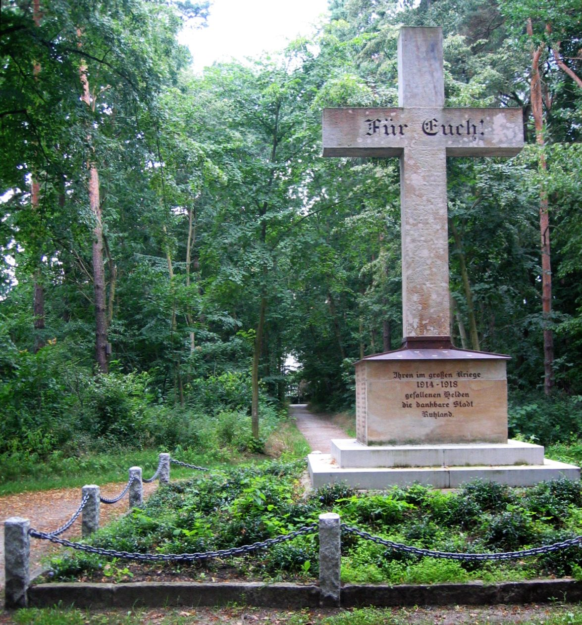 Kreuz im "Heldenhain", Geschwister-Scholl-Weg in Ruhland (Denkmal für die im 1. Weltkrieg gefallenen Ruhlander Bürger; namentliche Nennung mit Todesdatum am Sockel)